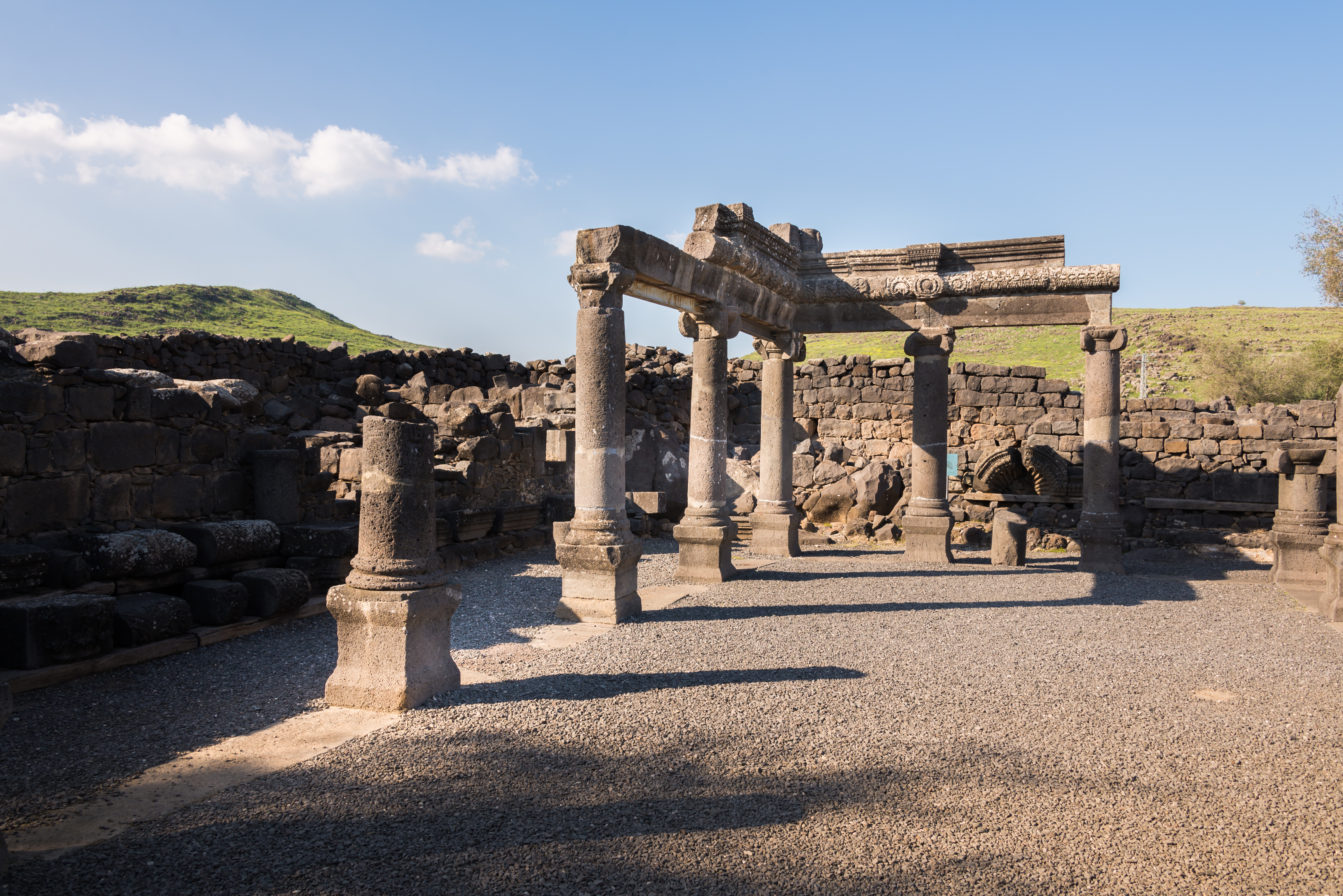 כורזים הוא יישוב קדום, שעמד על תילו מתחילת המאה הראשונה לספירה ועד המאה השמינית. הוא מוזכר בתלמוד ובברית החדשה. הוא זוהה באתר ארכאולוגי שנקרא ח'רבת כראזה, כ-4 קילומטר צפונית לכפר נחום. תקופת הפריחה של העיר הייתה כנראה בסוף המאה השלישית ובתחילת הרביעית. הרמה הבזלתית שהאתר נמצא בה קרויה על שמו רמת כורזים. כיום האתר הוא גן לאומי.